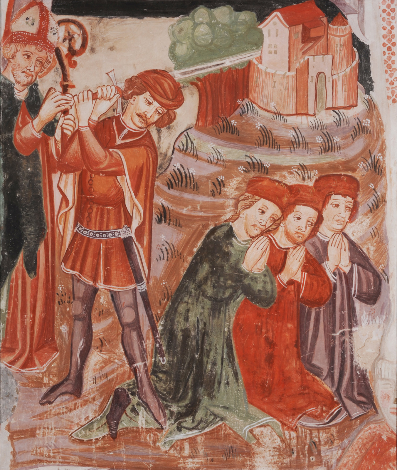 Po freski v p. c. sv. Miklavža na Visokem pod Kureščkom. Kopist: Rudi Pergar (1964).